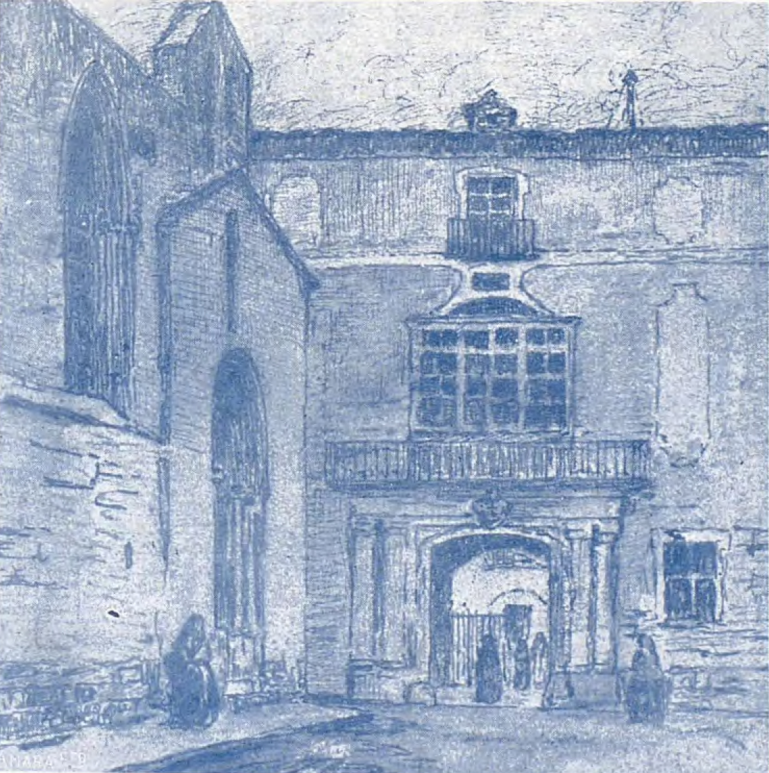 El Palacio del Obispo, de Barcelona.